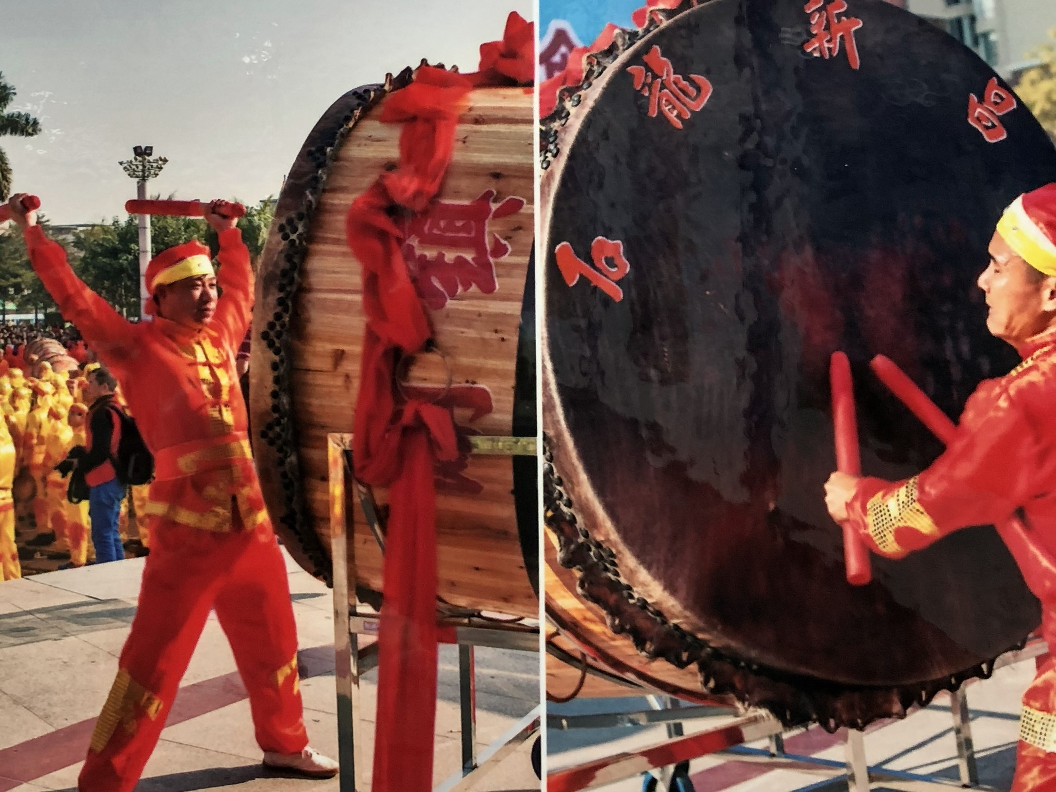 中文（中国大陆）: 博罗大鼓。